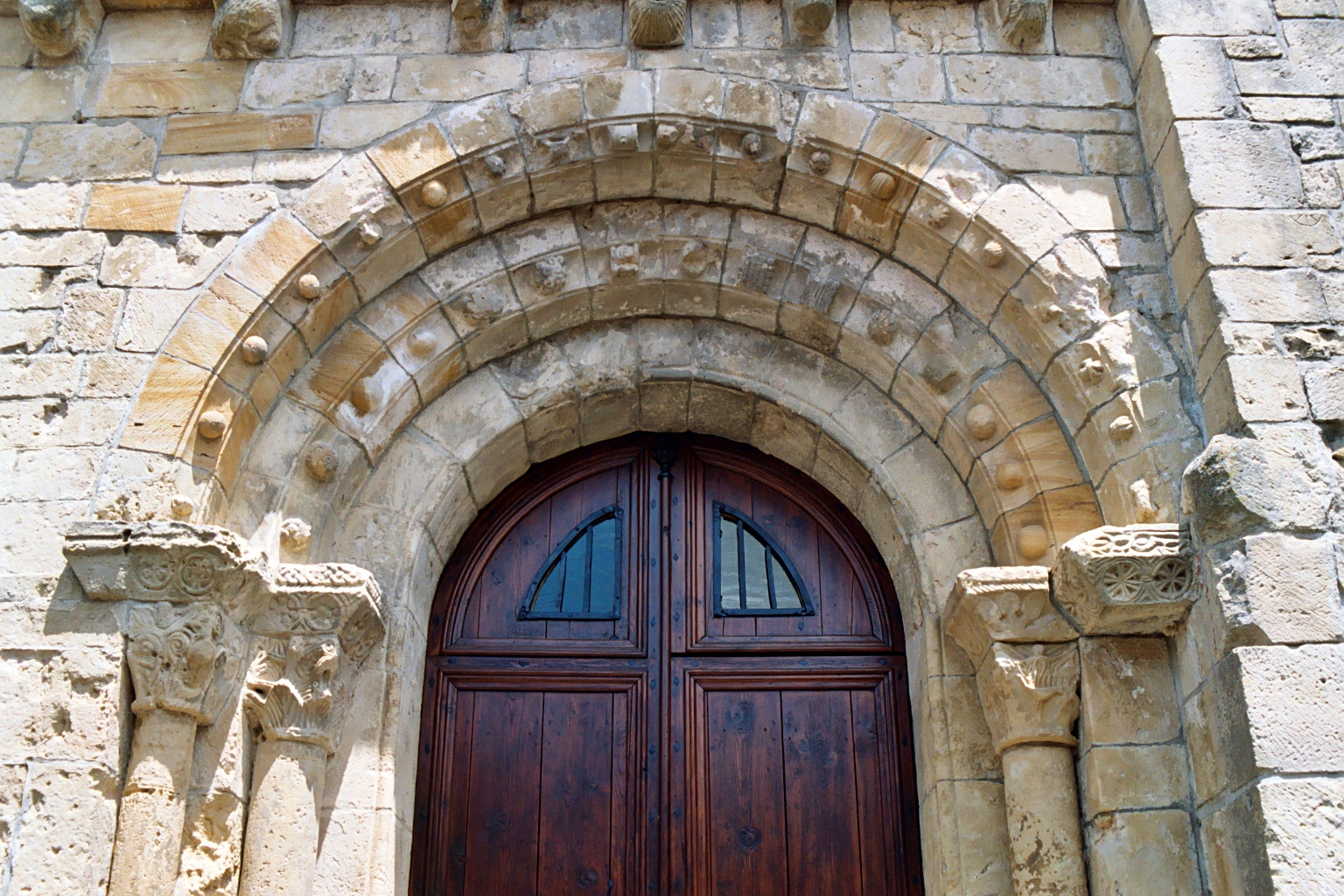 France - Languedoc - Aude - Église de Payra-sur-l'Hers